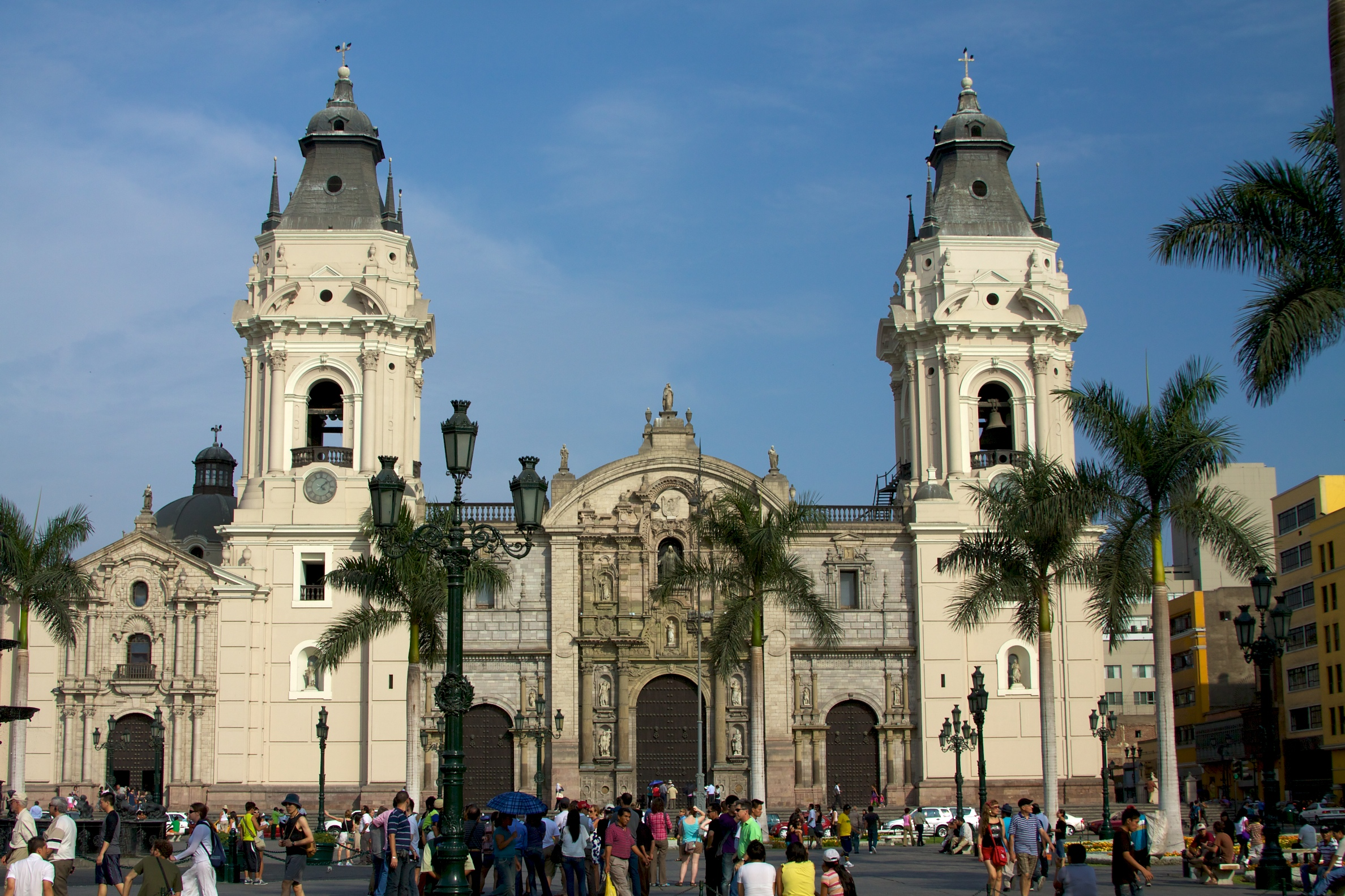 Peru - Lima 085 - La Catedral de Lima